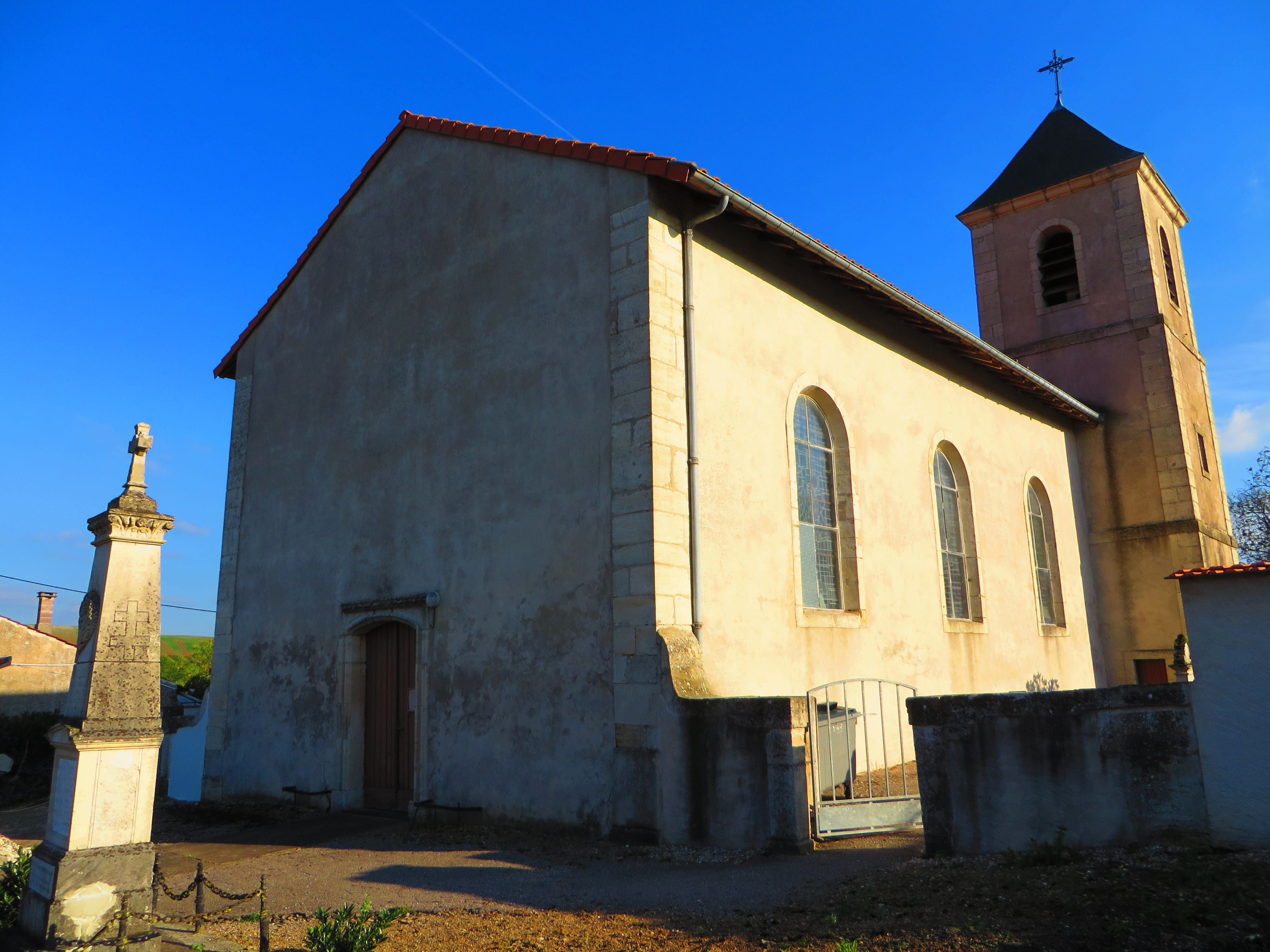 Puttigny l'église Notre-Dame